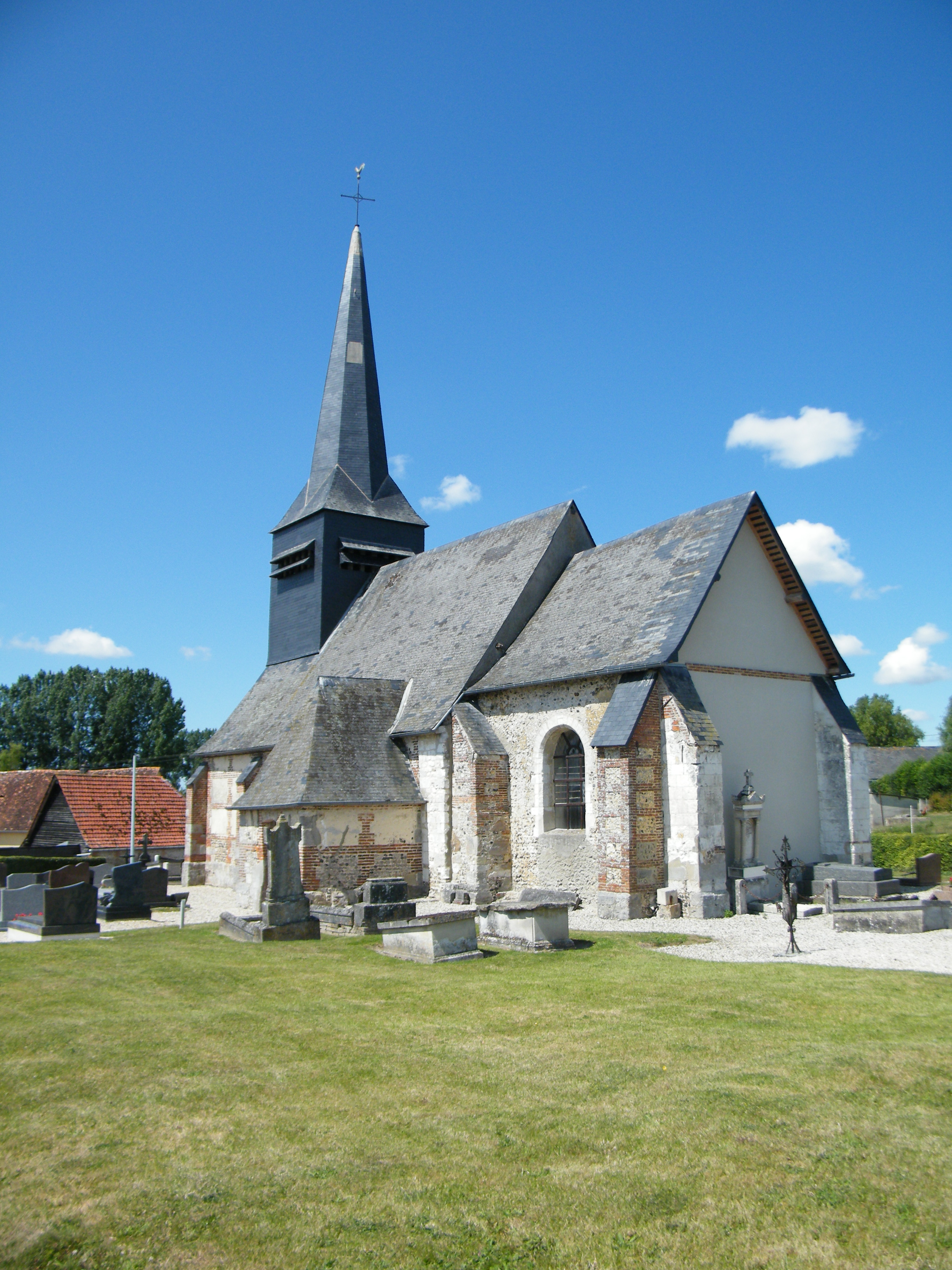 Fréauville, Seine-Maritime, France, église